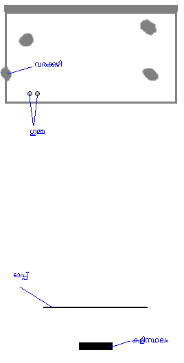 ചിത്രം എങ്ങനെയുണ്ടെന്നു നോക്കൂ.. കുഴപ്പമില്ലെങ്കിൽ കുറിപ്പുകൾ ചേർക്കാം